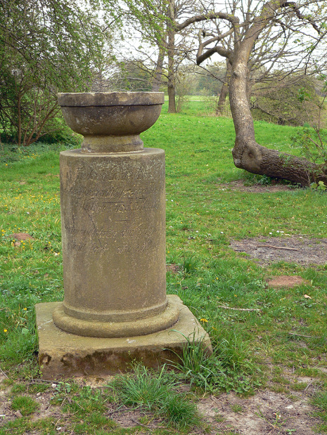 Hinüber Denkmal Hinüberscher Garten